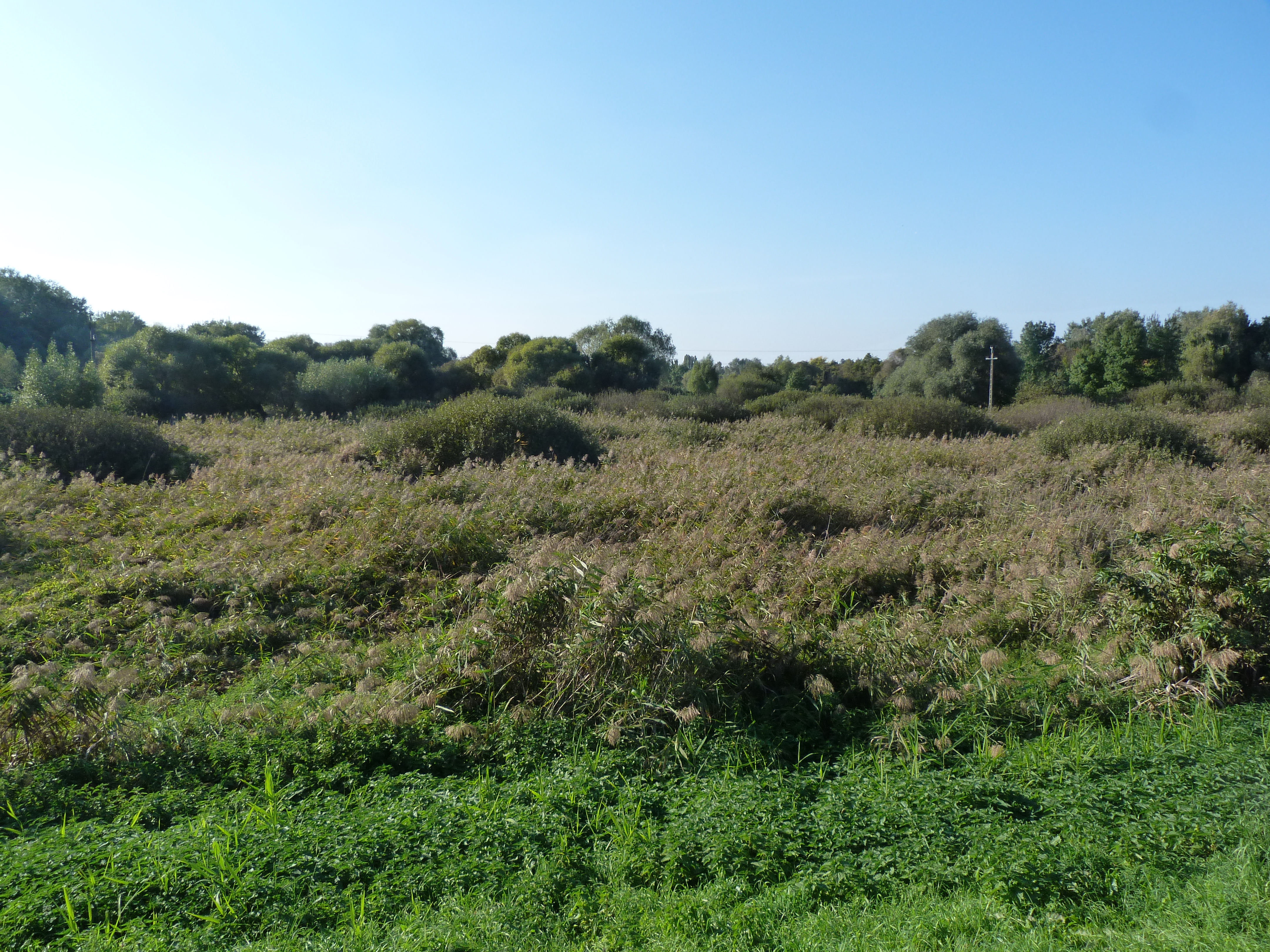 A felvétel 2014. szeptember 28-án, vasárnap készült Budapesten, a Naplás tónál (XVI. kerület). ©© Derzsi Elekes Andor, Budapest 2014, You are authorised to use these photos and vids under Creative Commons – even for commercial, for profit purposes. Photos must be attributed to Derzsi Elekes Andor. All of the photos and vids in the Metapolisz DVD line are under Creative Commons and can be used even for commercial – for profit – purposes. Recommended Citation Derzsi Elekes Andor: Metapolisz DVD line